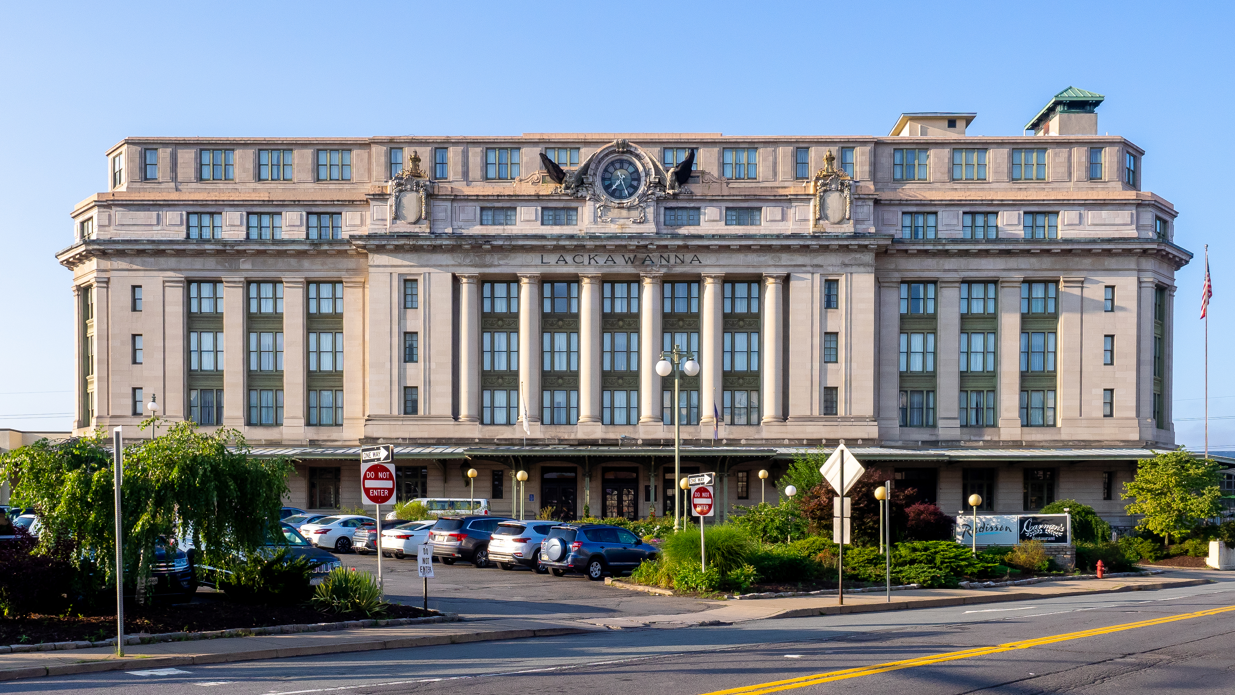 Scranton, PA